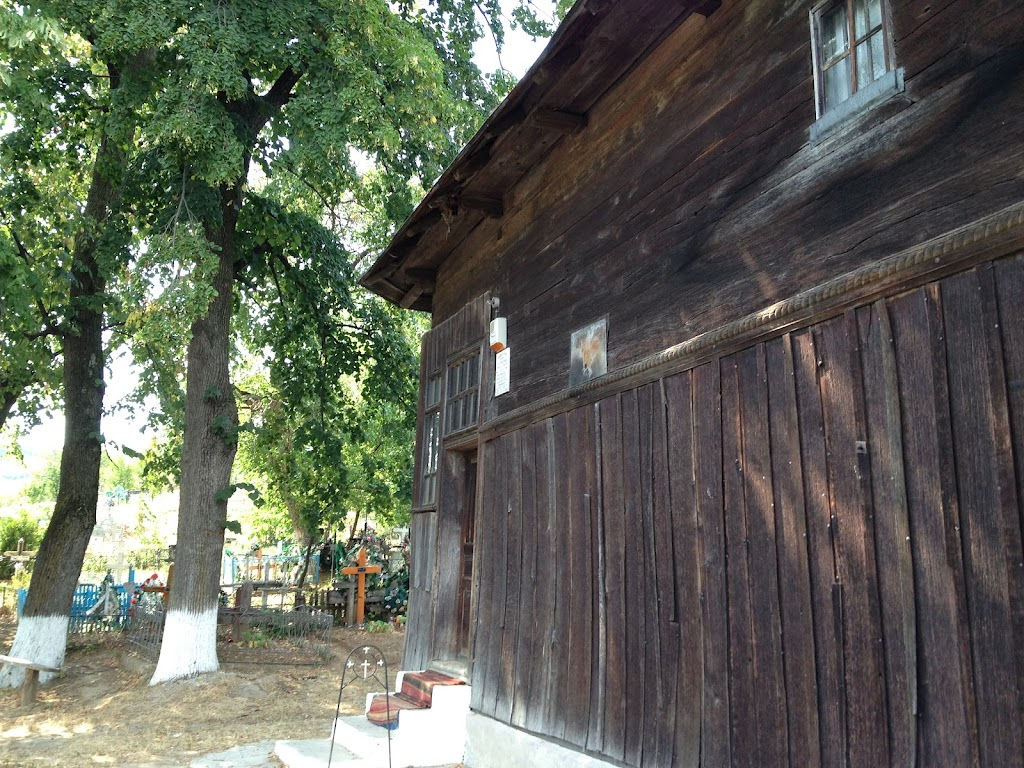 Biserica ridicata intre anii 1784-1787 de mesterii Vasilache Tranca si Iosib Onciul cu material lemnos taiat de la fata locului.Clopornita bisericii reprezinta un alt monument, clopotele fiind turnate la Viena(Austria) in anul 1792 01